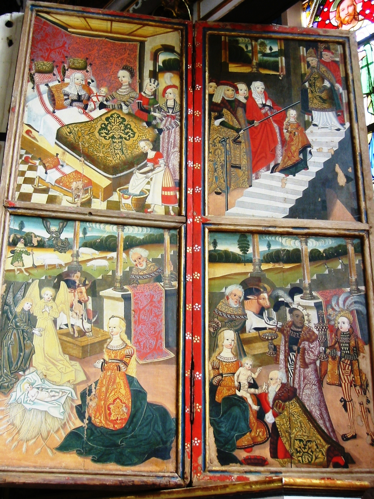 Rechter Flügel des Altaraufsatzes in der Kirche in Wusterhusen. Er zeigt zusammen mit dem rechten Flügel farbige Bilder aus dem Annen- und Marienleben.